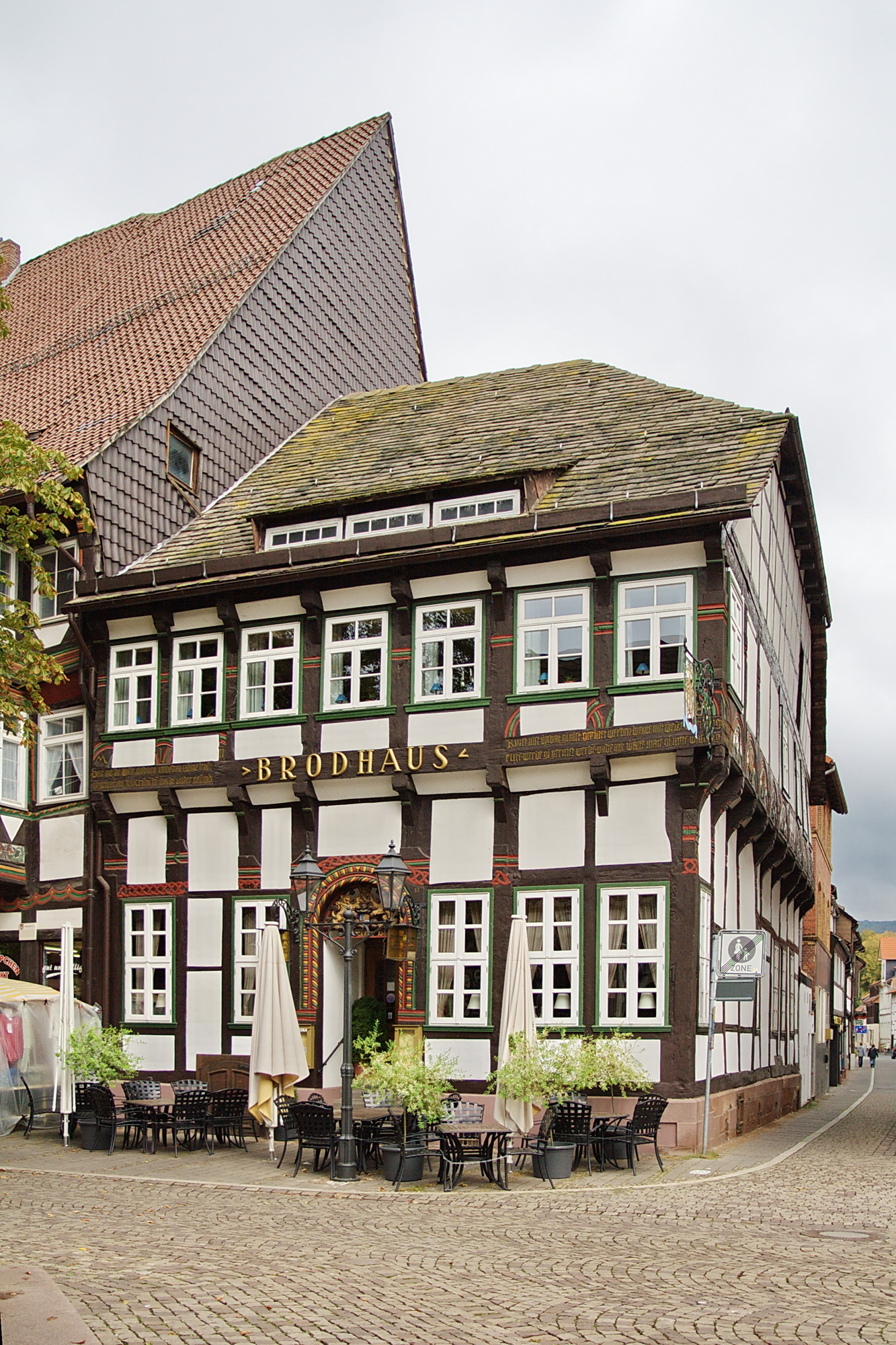 Brodhaus der Bäckerinnung in Einbeck, Niedersachsen, Deutschland